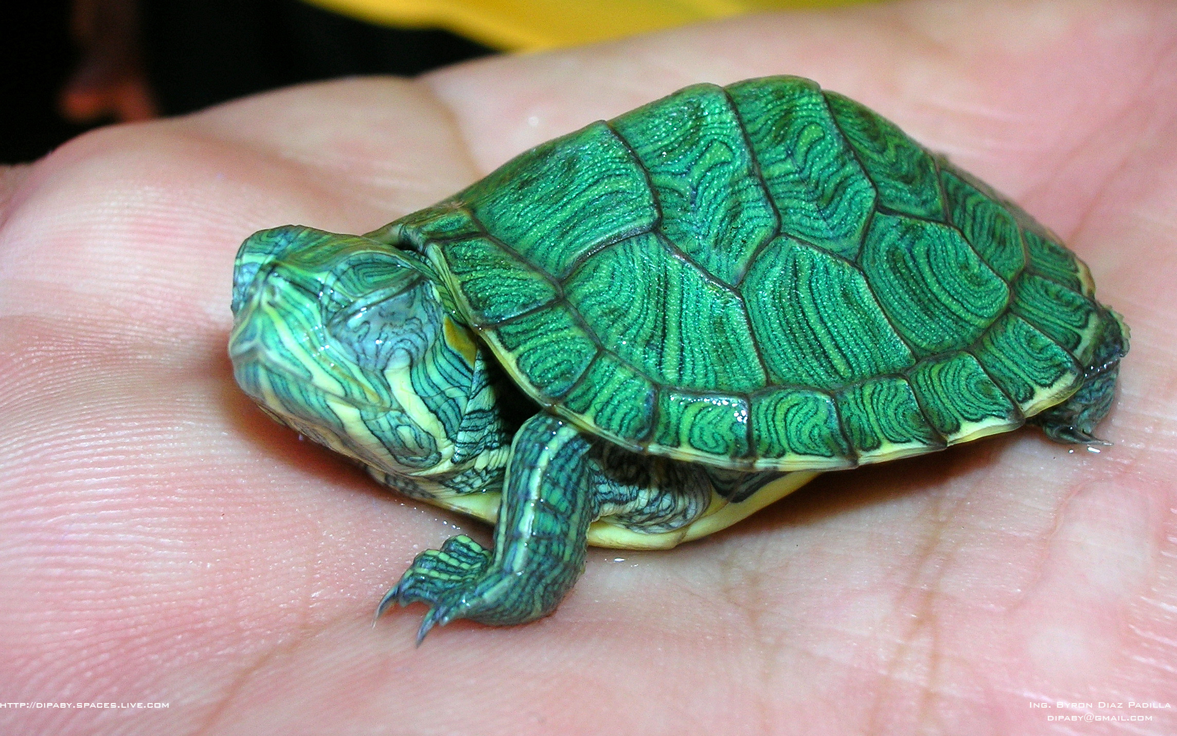 Tortuga especie Trachemys Scripta Elegan.